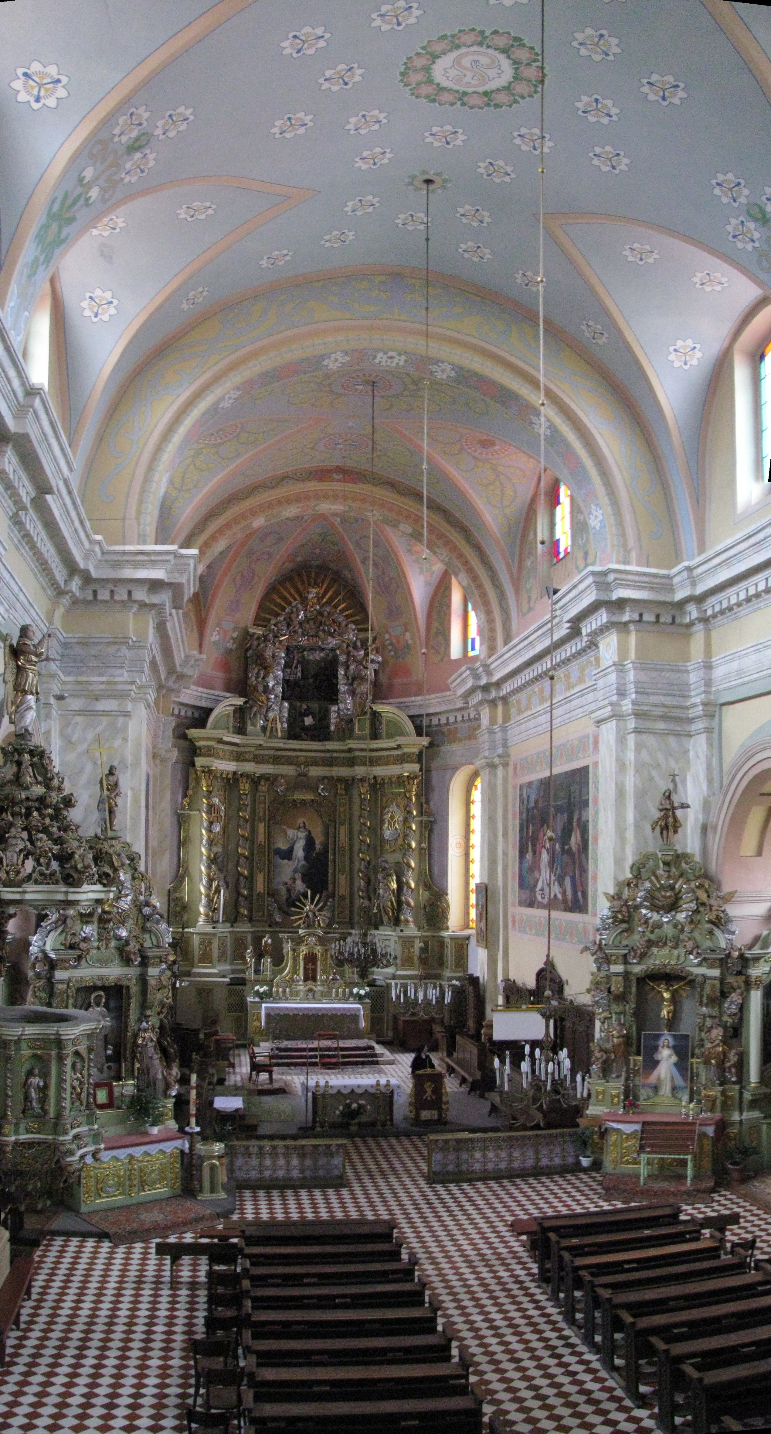 Беларуская (тарашкевіца): Ансамбль былога кляштара францысканцаў у межах агароджыдэкаратыўнае ўбраньне касьцёла:6 алтароў са скульптурай амбонроспісы скляпеньняў2 фрэскі ў бакавых алтарах. г. Пінск This is a photo of Belarusian heritage monument. Reference number: 111Г000538 ( WLM)